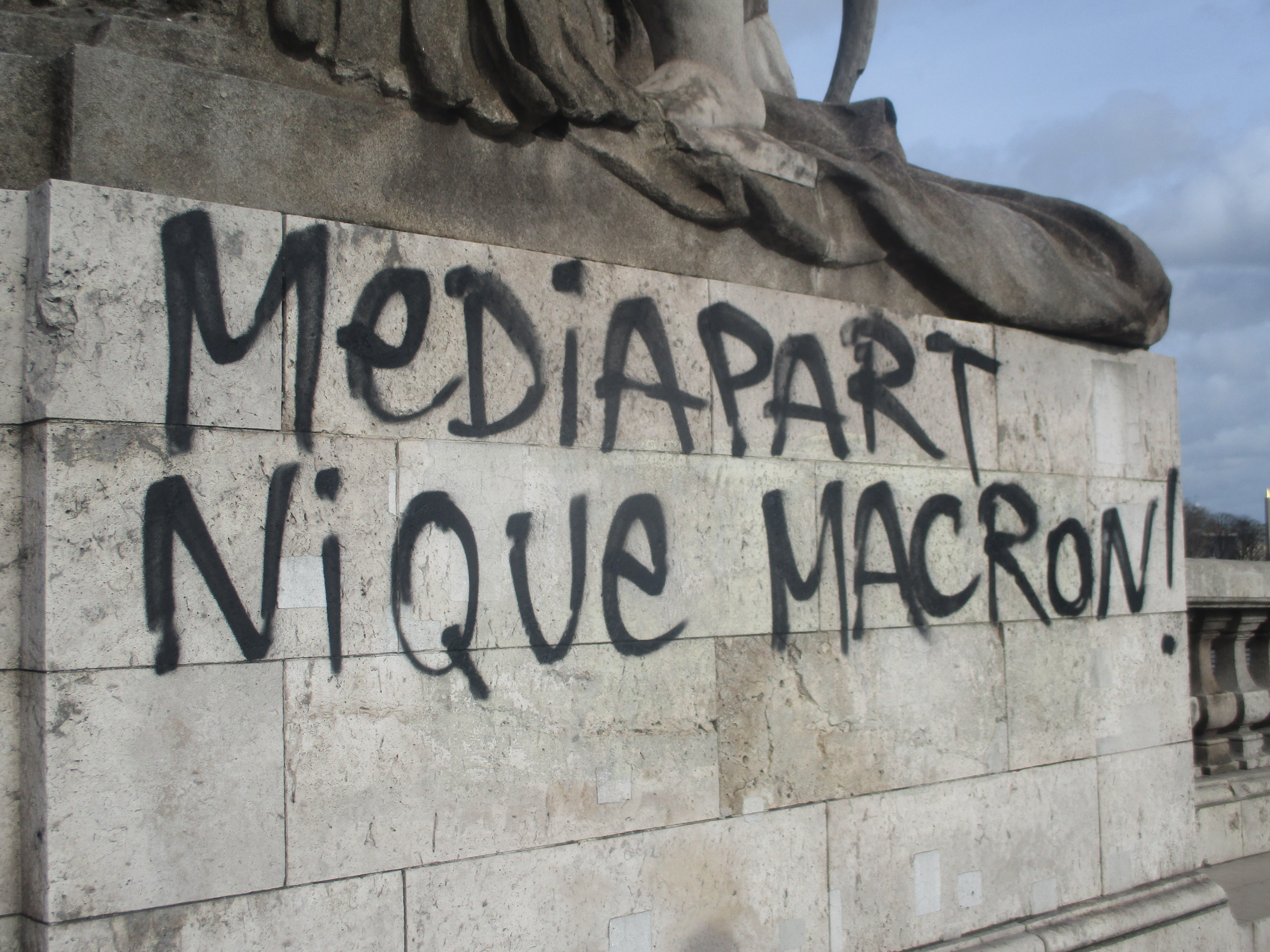 Graffiti au pont Alexandre III à Paris, le jour de la manifestation des gilets jaunes du 9 février 2019.